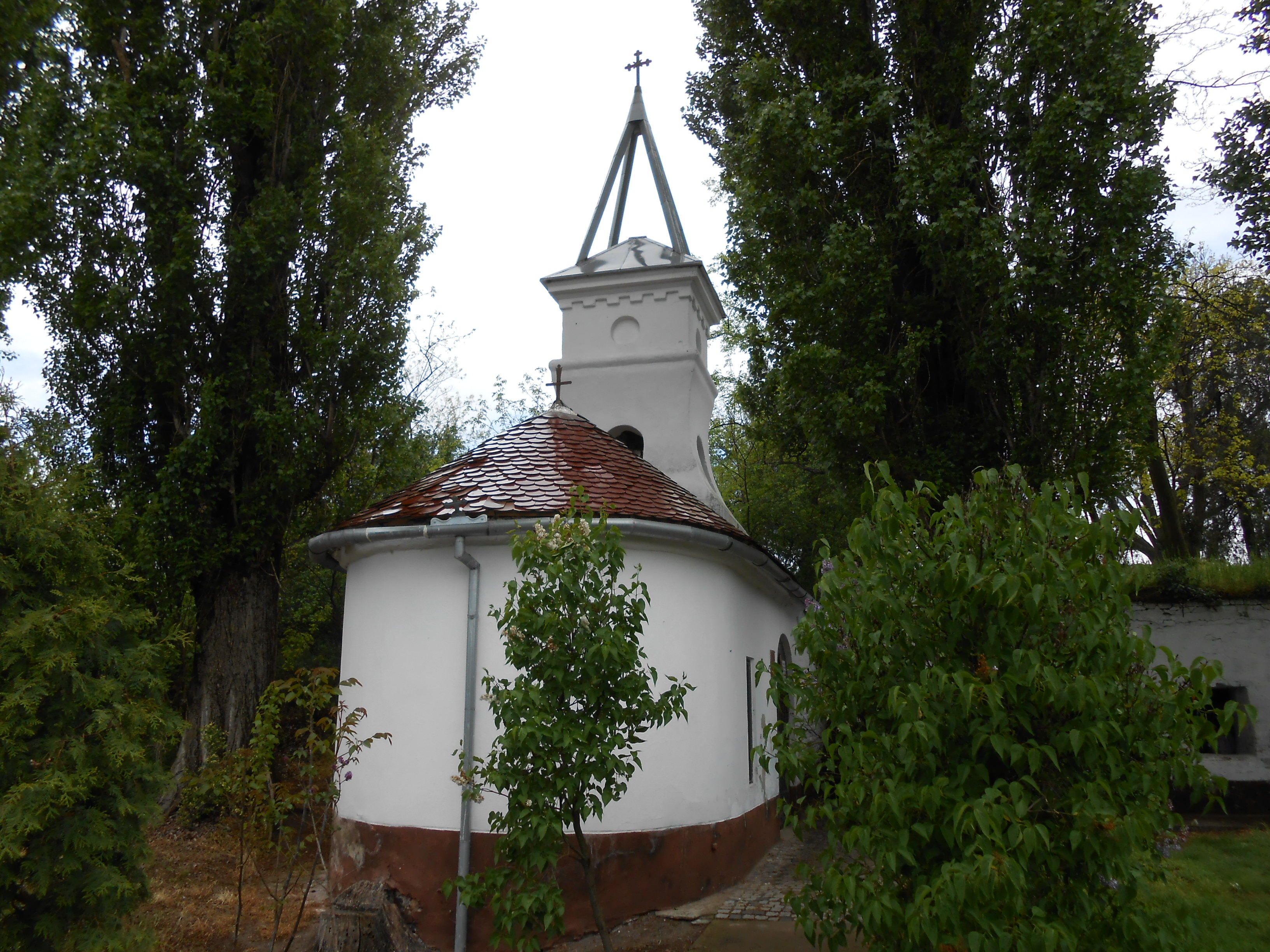 Богомоља „Водице“ у Кикинди